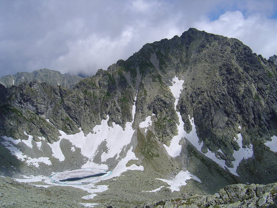 Strbsky stit over Okruhle pleso from Bystre sedlo